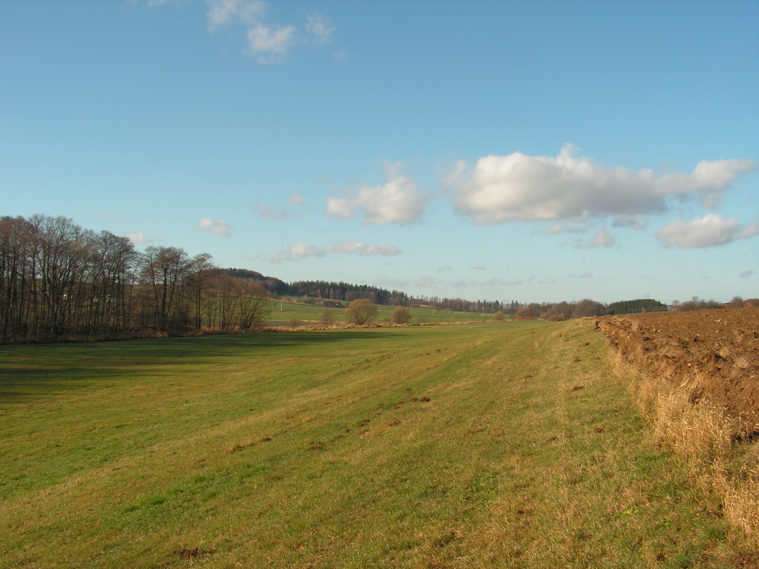 Údolí Jiříkovského potoka (Sázavky) pod Jiříkovským rybníkem mezi osadami Proseč a Miřátky.